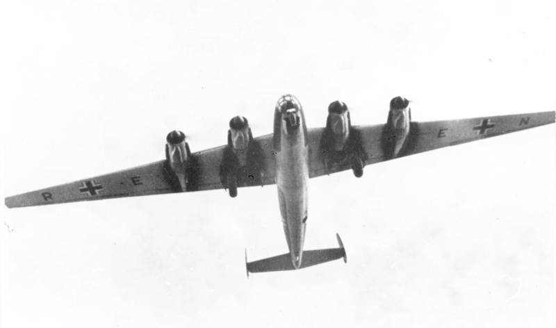 Me 264 V1 Fernbomber, Aufklärer 1942. Werkfoto Messerschmitt (MBB) 2/264